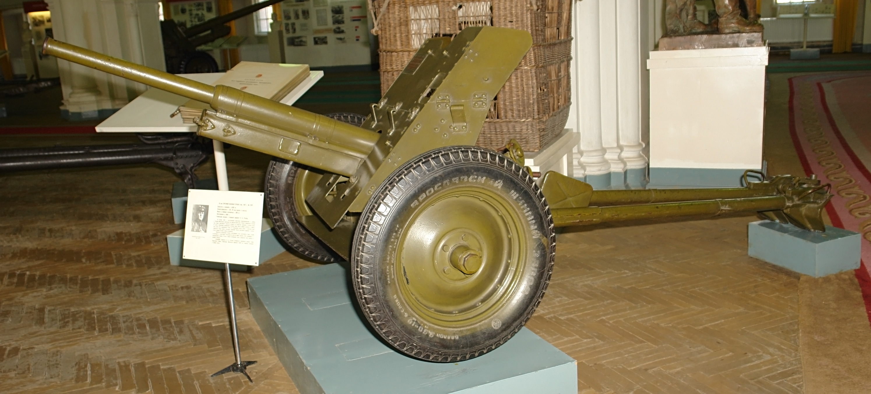 45-мм ПРОТИВОТАНКОВАЯ ПУШКА обр. 1937 г. № 3767 Дальность стрельбы — 4200 м. Скорострельность — 20—25 выстрелов в минуту. Масса в боевом положении — 560 кг. Изготовлена в 1942 г. Командир орудия — старший сержант Н. А. Рытов. 16 января 1944 г. наступающим советским подразделениям в районе д. Исаево Молкуново преградил путь фашистский дзот. Расчет коммуниста Рытова под огнем противника выкатил орудие на открытую позицию и открыл огонь по дзоту. Осколками вражеского снаряда были убиты номера расчета, а командир ранен. Но, превозмогая боль, он продолжал вести огонь и заставил дзот "замолчать". Наша пехота овладела деревней. Когда противник перешел в контратаку, орудие Рытова вновь заговорило. Выпустив последний снаряд, артиллерист стал уничтожать врага огнем автомата и гранатами. Раненный, он упал на лафет орудия. „Рус, сдавайся!" — послышалось рядом. Рытов, собрав последние силы, выдернул чеку гранаты и разжал пальцы. Старшему сержанту Н. А. Рытову посмертно присвоено звание Героя Советского Союза. Приказом Министра обороны СССР он навечно зачислен в списки части. Военно-исторический музей артиллерии, инженерных войск и войск связи, Санкт-Петербург.